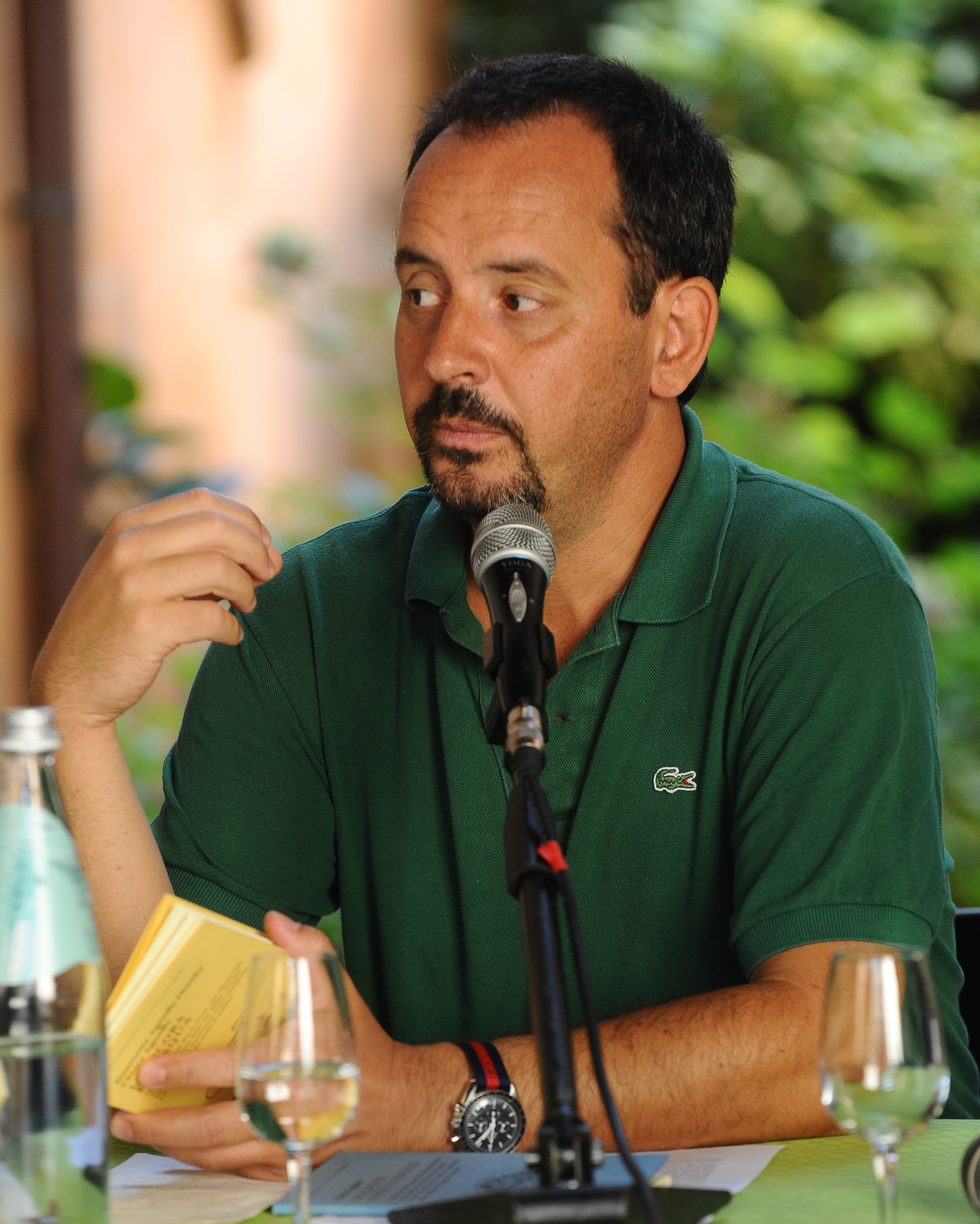 Giovanni Nucci a Mantova per il Festivaletteratura 2012.